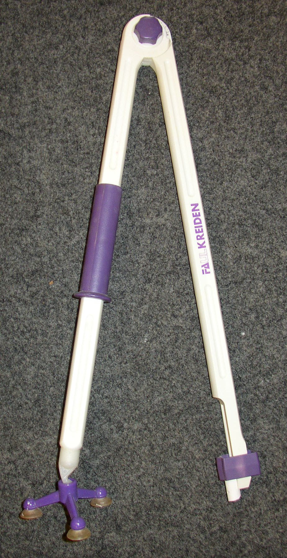 Tafelzirkel